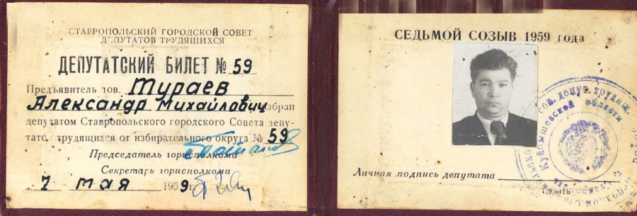 Депутатский билет Тураева Александра Михайловича, члена тольяттинского совета депутатов трудящихся